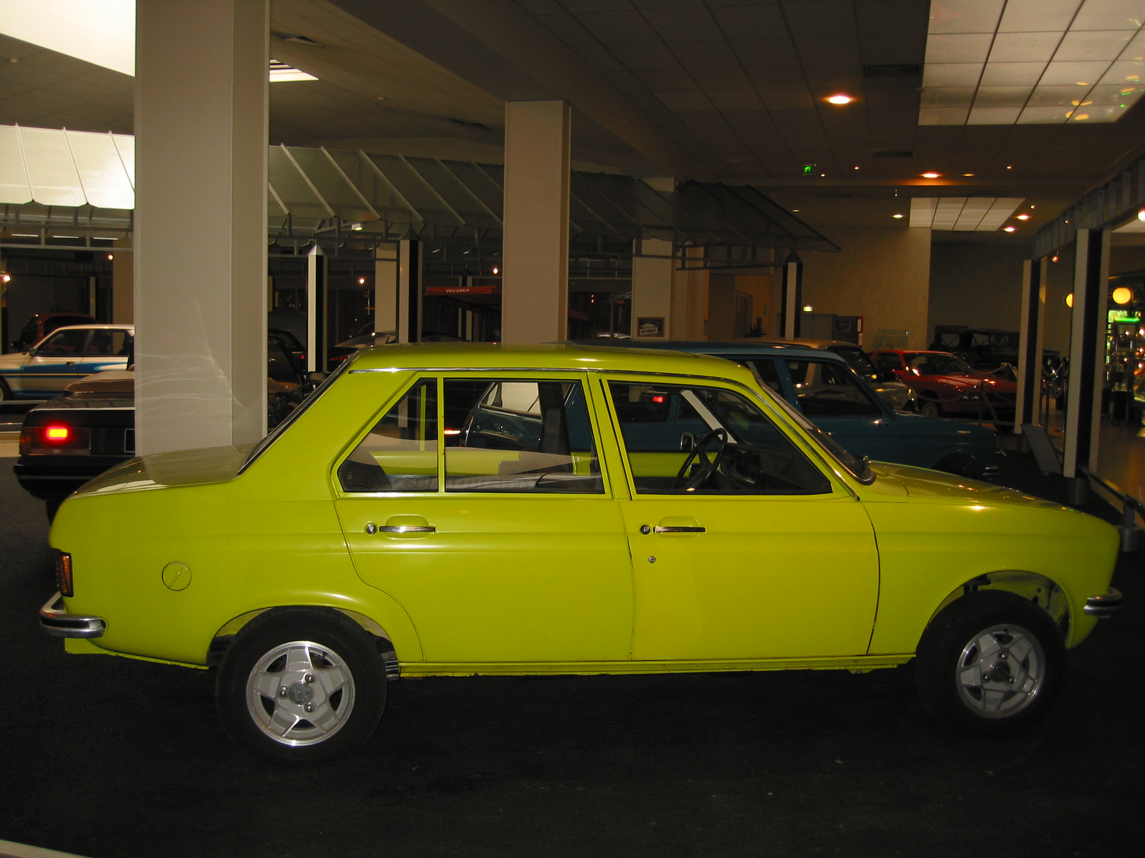 Peugeot 104 Berline 1975